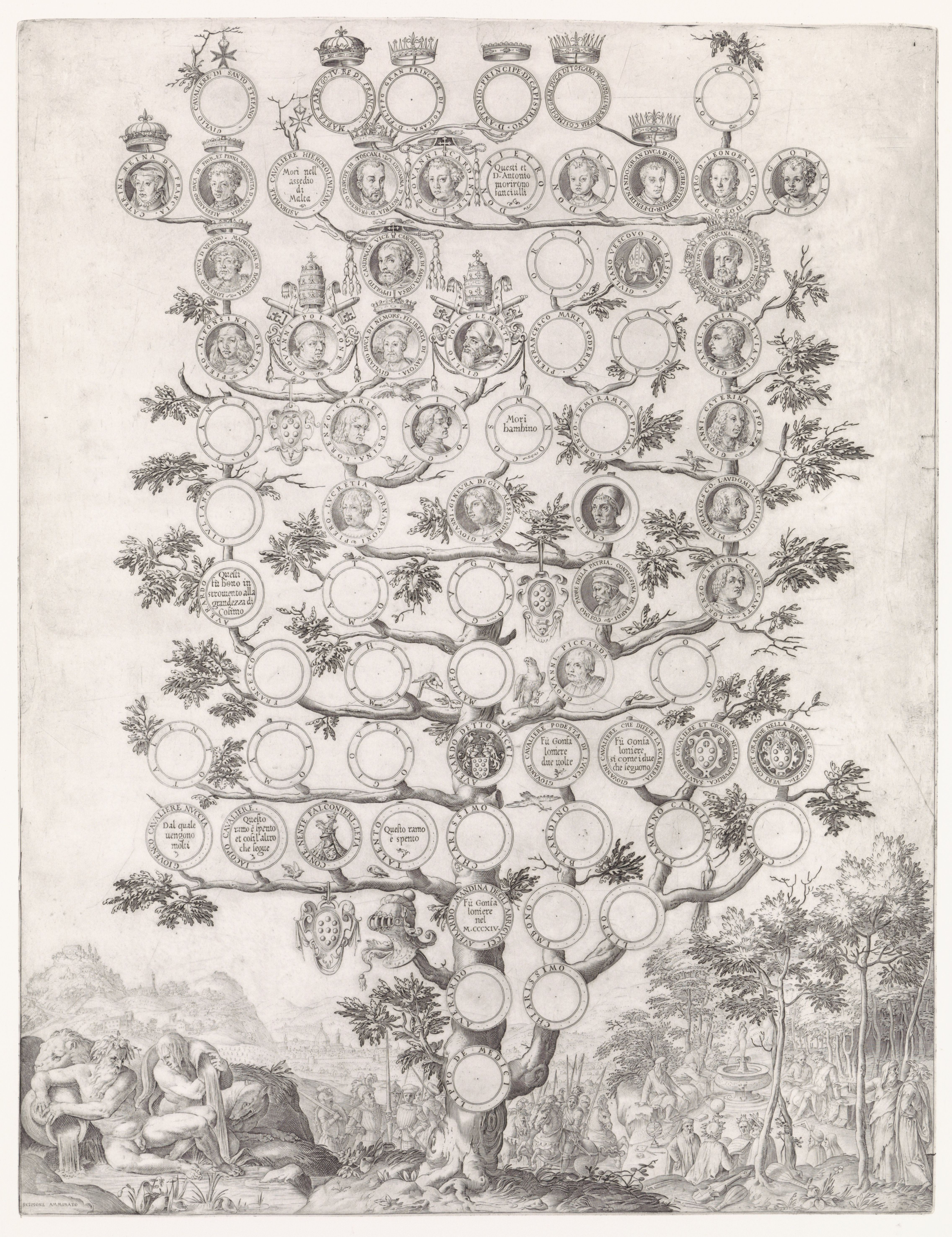 Stamboom van de familie Medici uit Florence. Sommige medaillons zijn ingevuld met wapens of portretten. De achtergrond toont de invloed van de familie in de regio. Linksachter een gezicht op de stad Florence. Linksvoor de riviergod van de Arno. Rechts een vergadering van de Vrije Kunsten bij een fontein. Direct achter de boom het leger van de Medici's.